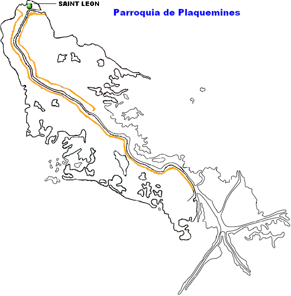 Saint Leon, Louisiana.